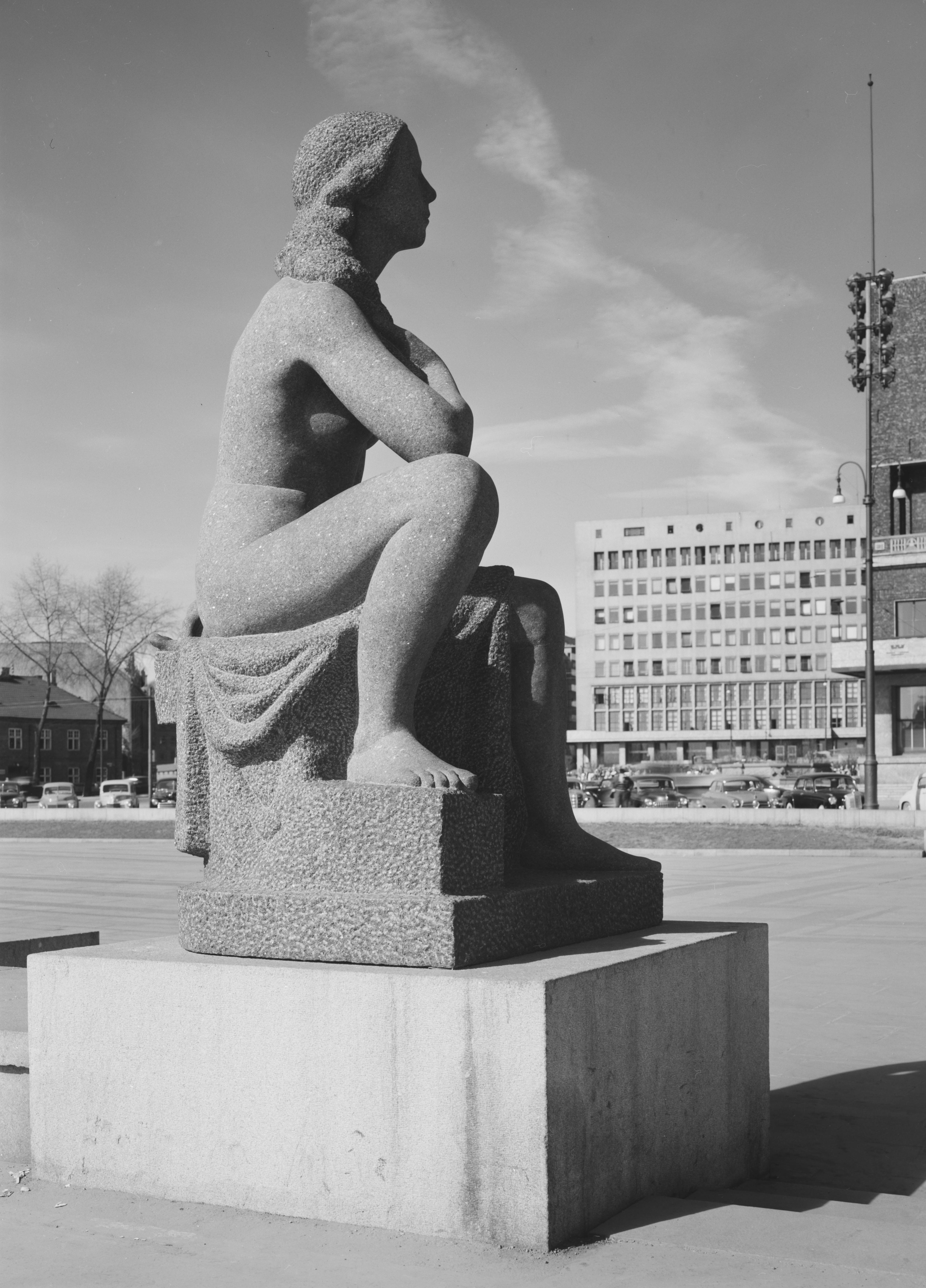 Bildet er hentet fra Nasjonalbibliotekets bildesamling Oslo,Rådhusplassen, Oslo, Oslo